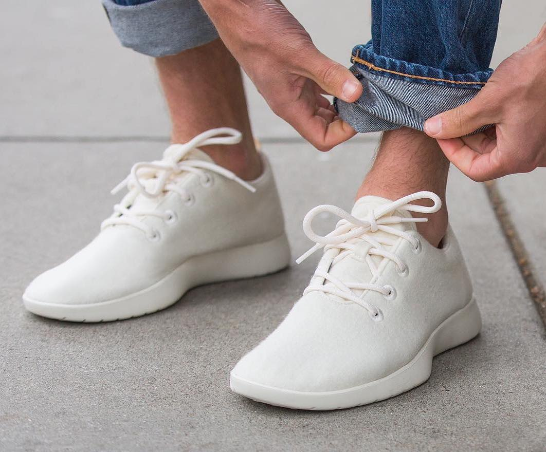 via Instagram ift.tt/2g3frbF